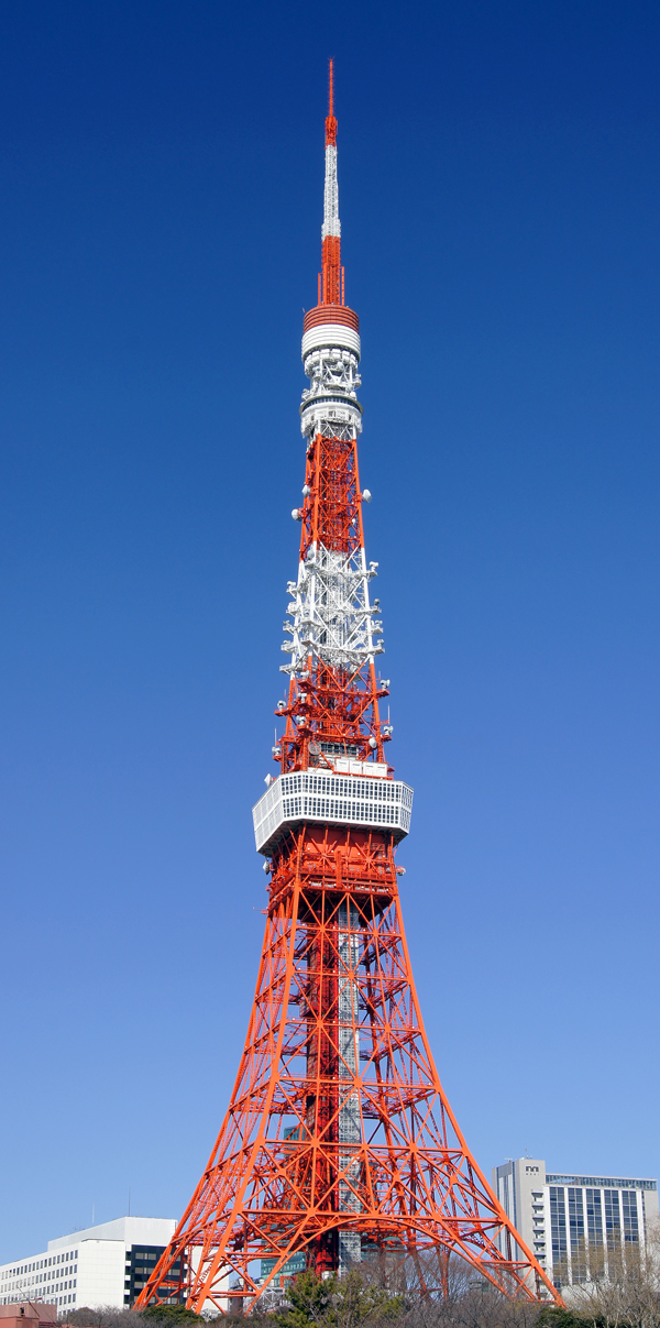 ザ・プリンス パークタワー東京敷地内より撮影